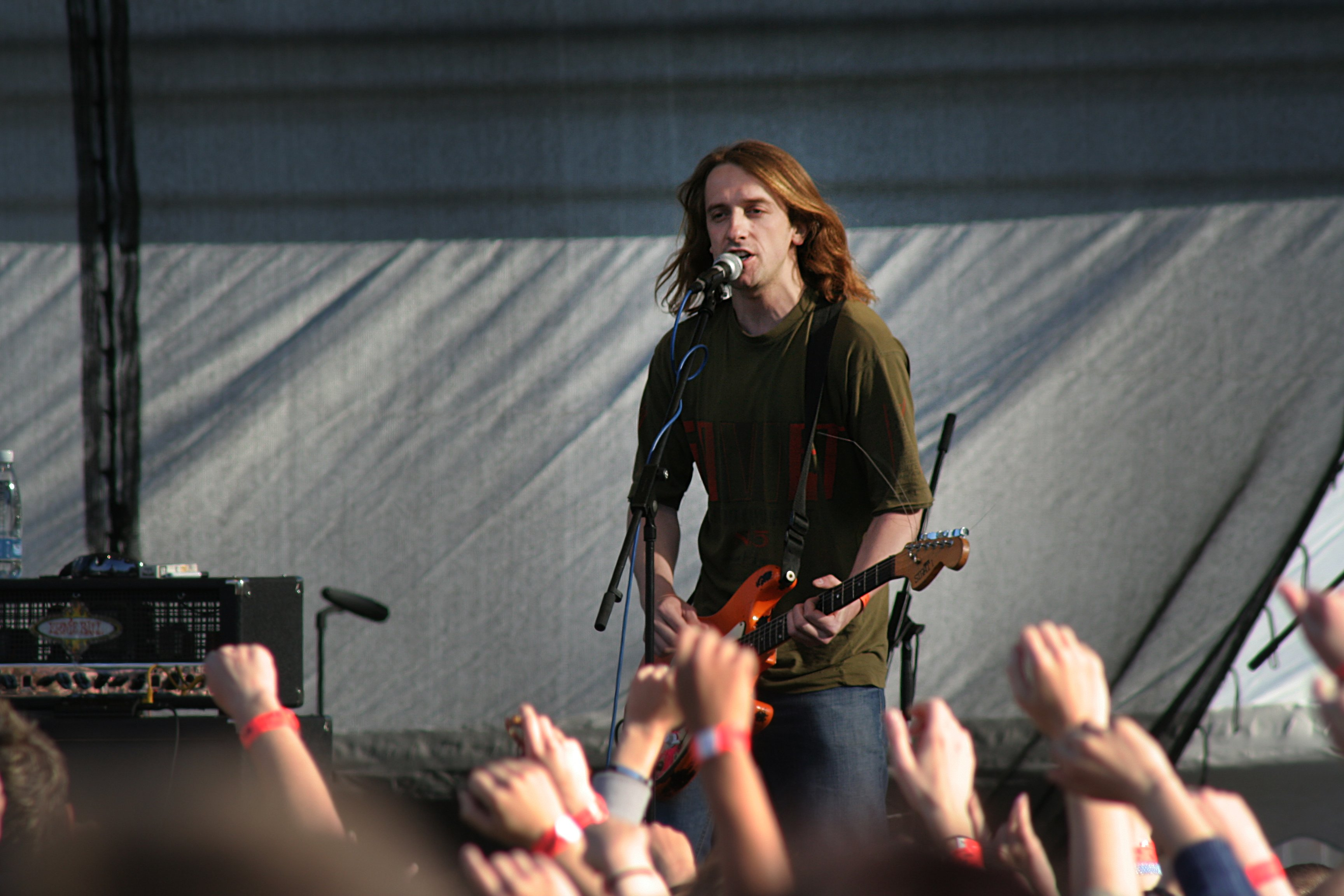 Márdi; Vypsaná fiXa concert, Mezi ploty festival